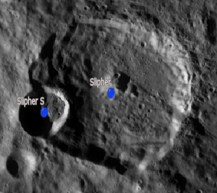 Cráter lunar Slipher. Cráteres satélite. (Imagen LRO)